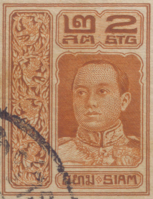 King Vajiravudh A stamp used in Rama VI's reign